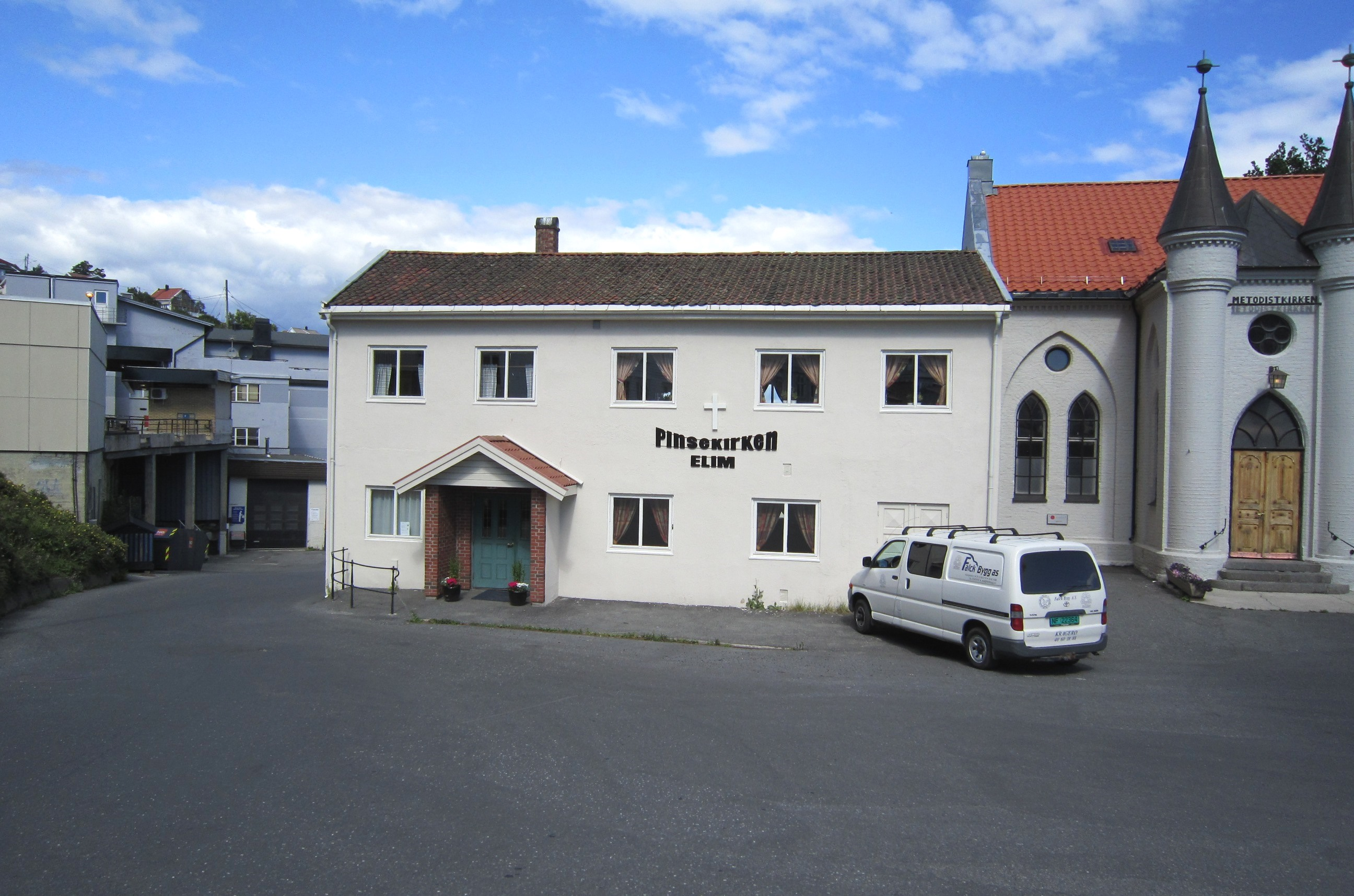 Fermannsbakken (FV253) går til venstre for pinsekirken Elim i Kragerø.